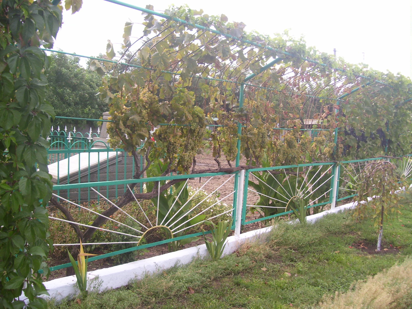 Сад біля Троїцької церкви, с. Зоря